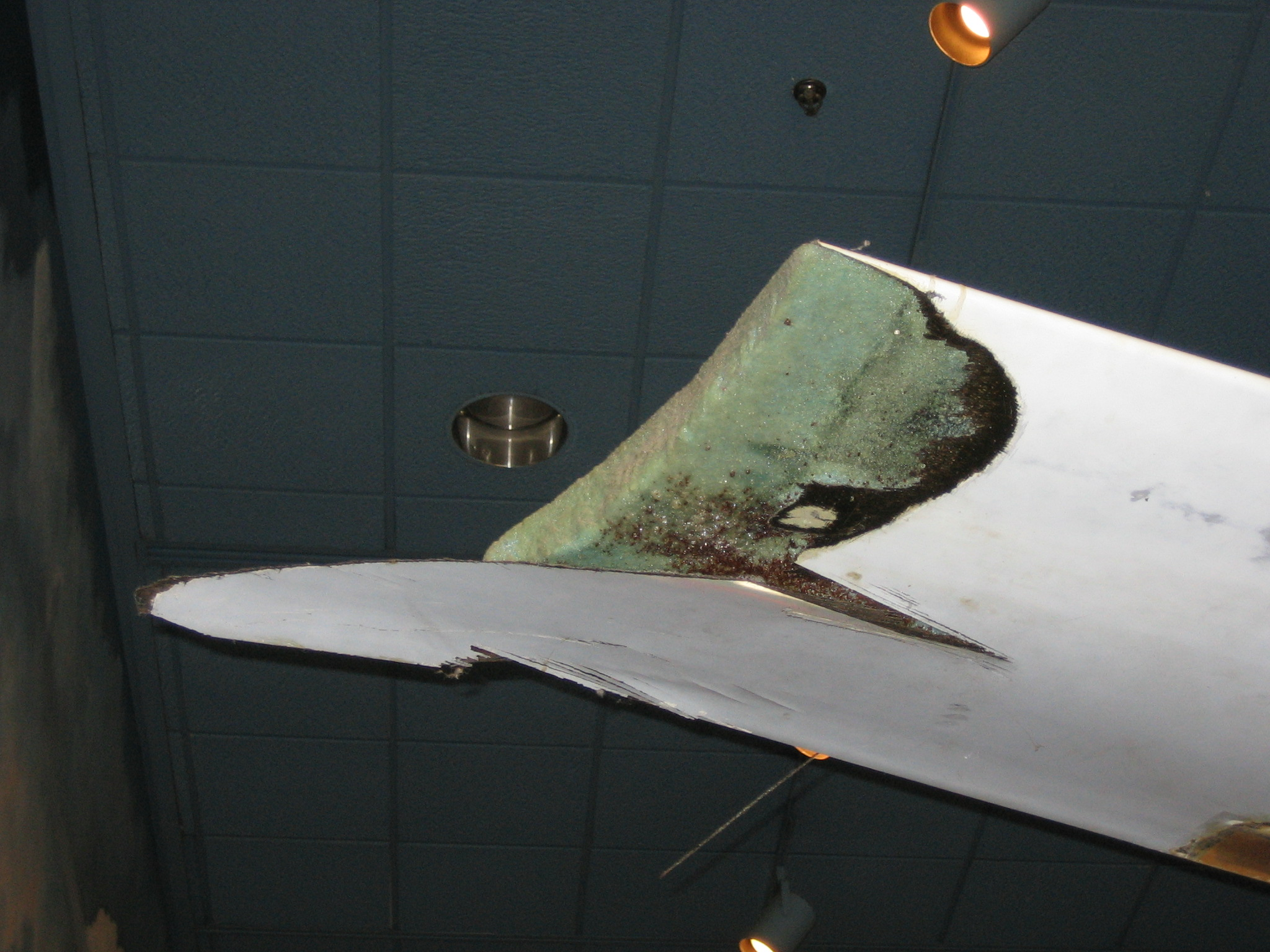 Saumon du Voyager abimé lors du décollage.